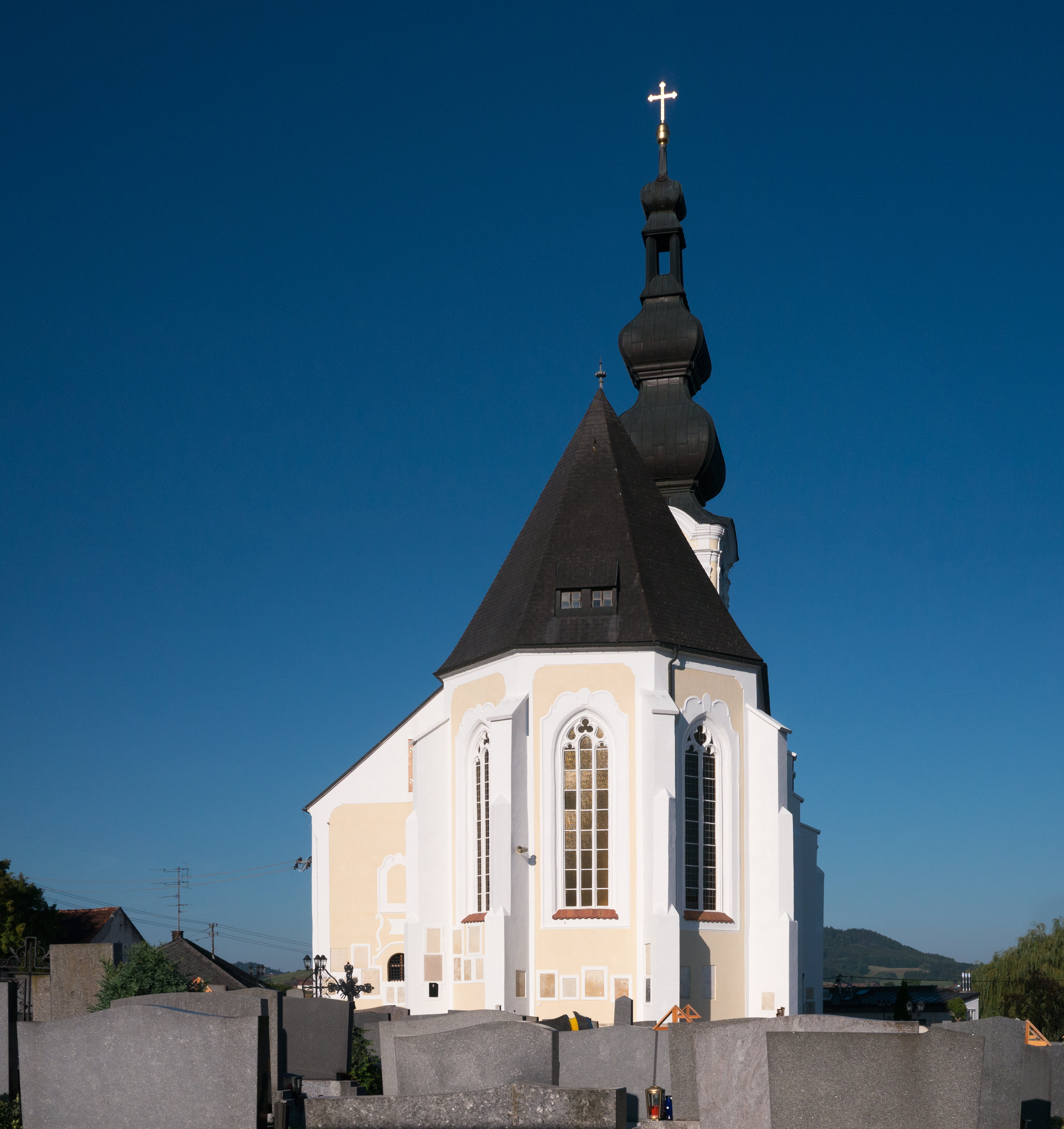 Kath. Pfarrkirche Mariä Himmelfahrt